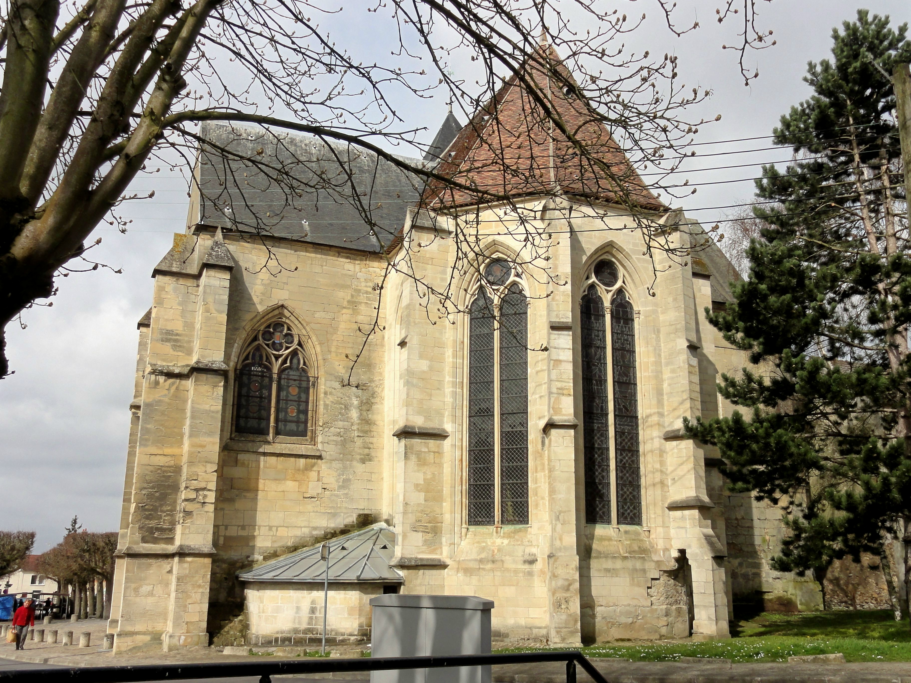 Chevet.